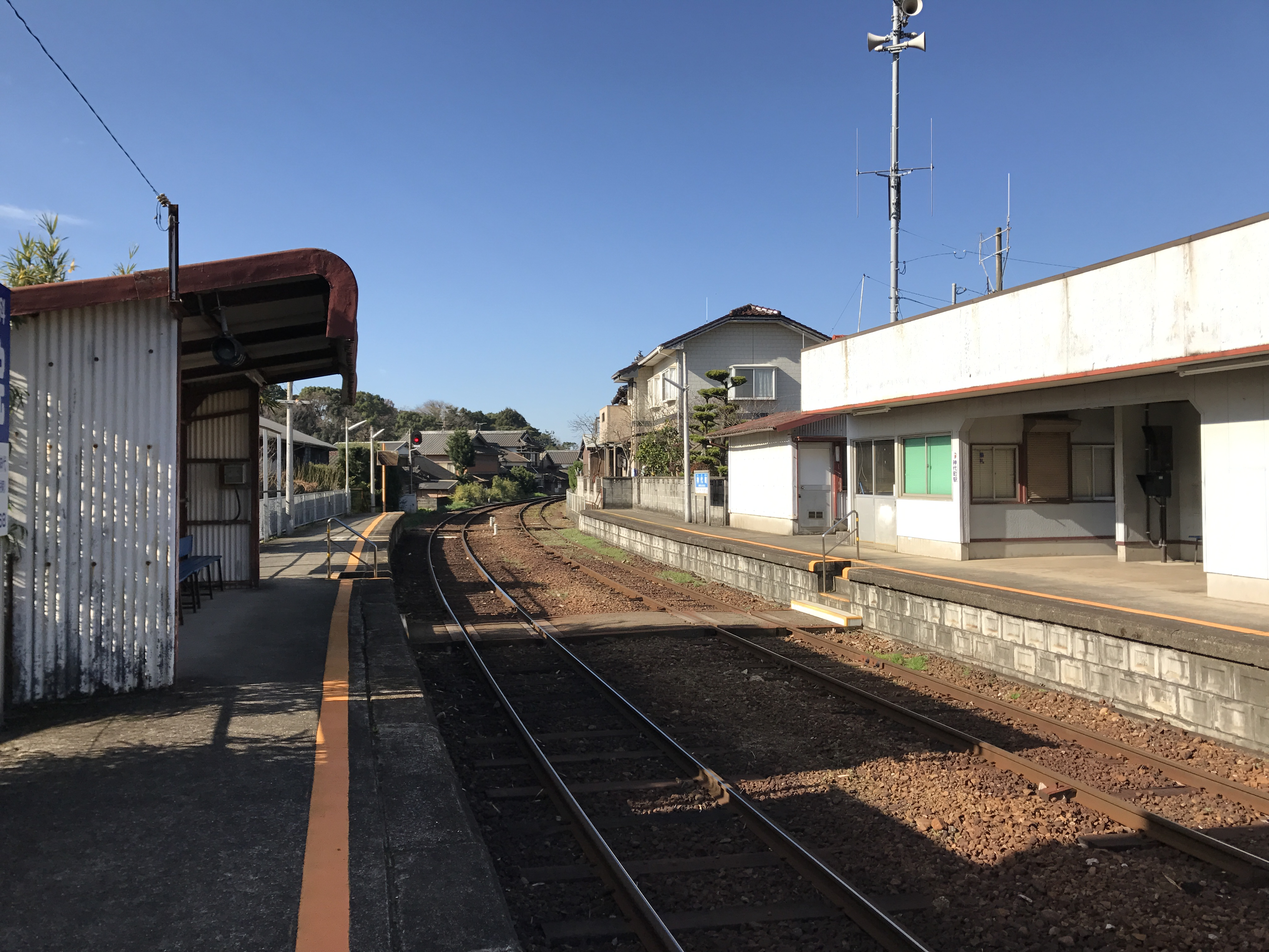 神代町駅のホーム(奥は西郷方面)